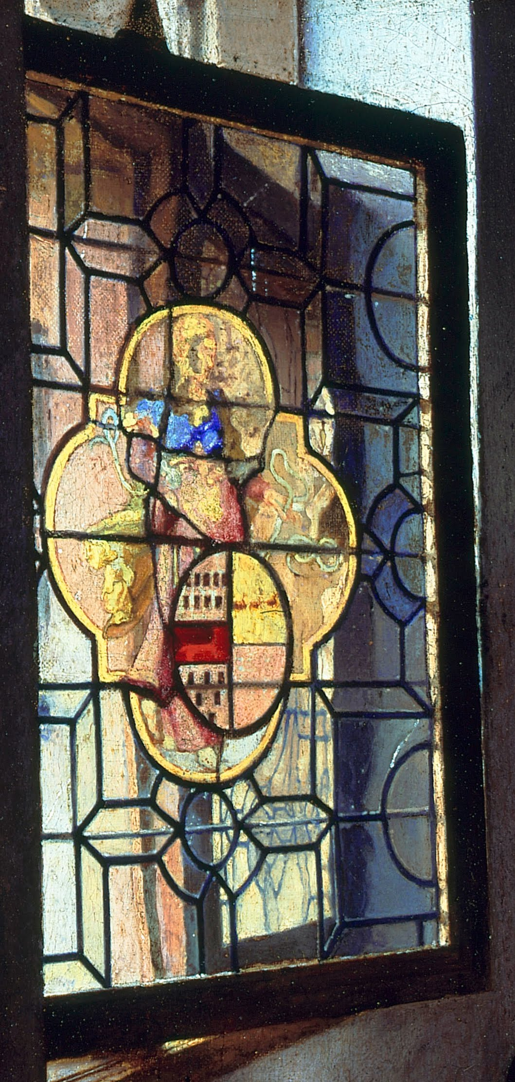 Vermeer Le Verre de vin detail de la fenetre